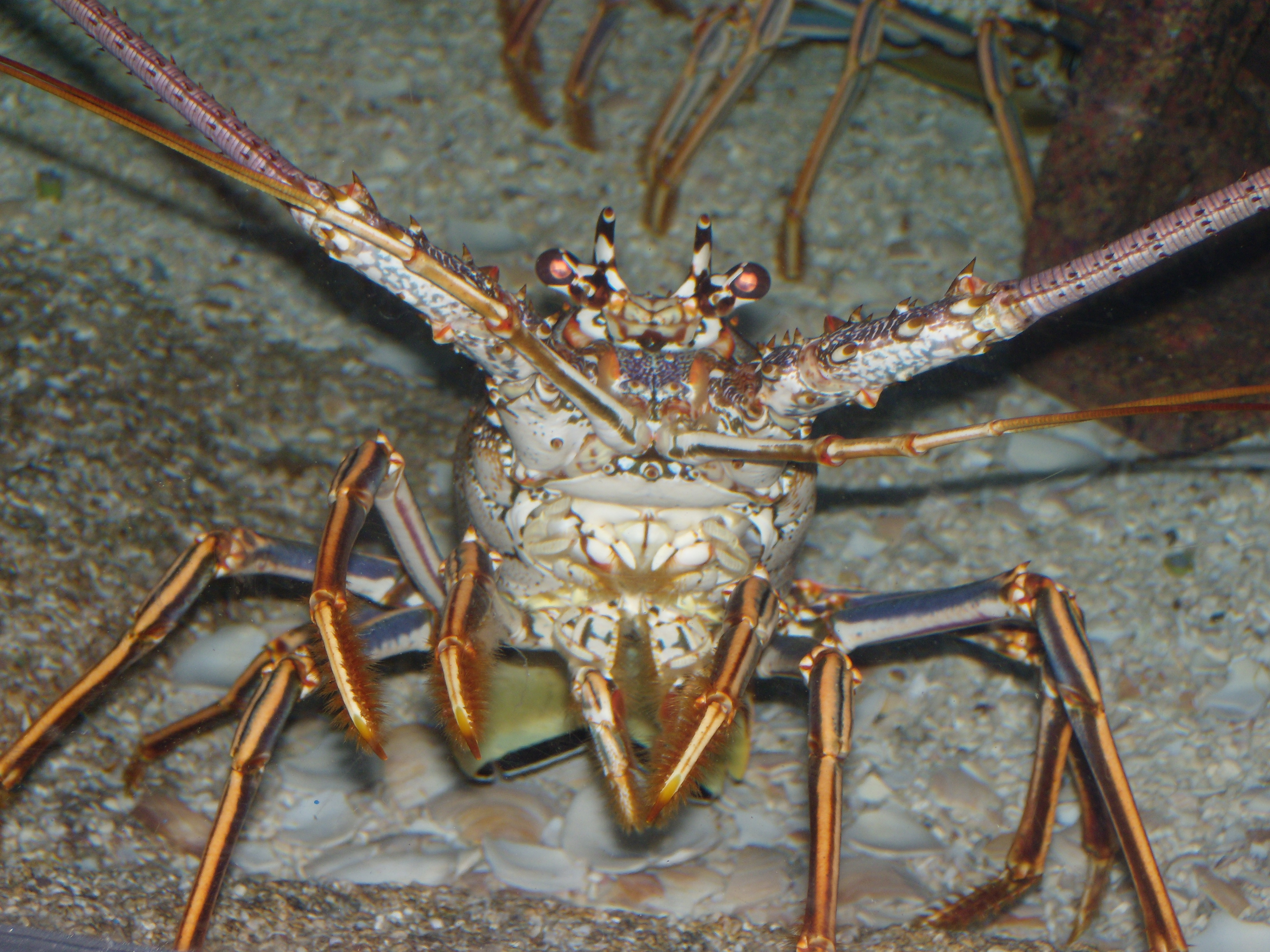 homard à Myrtle Beach